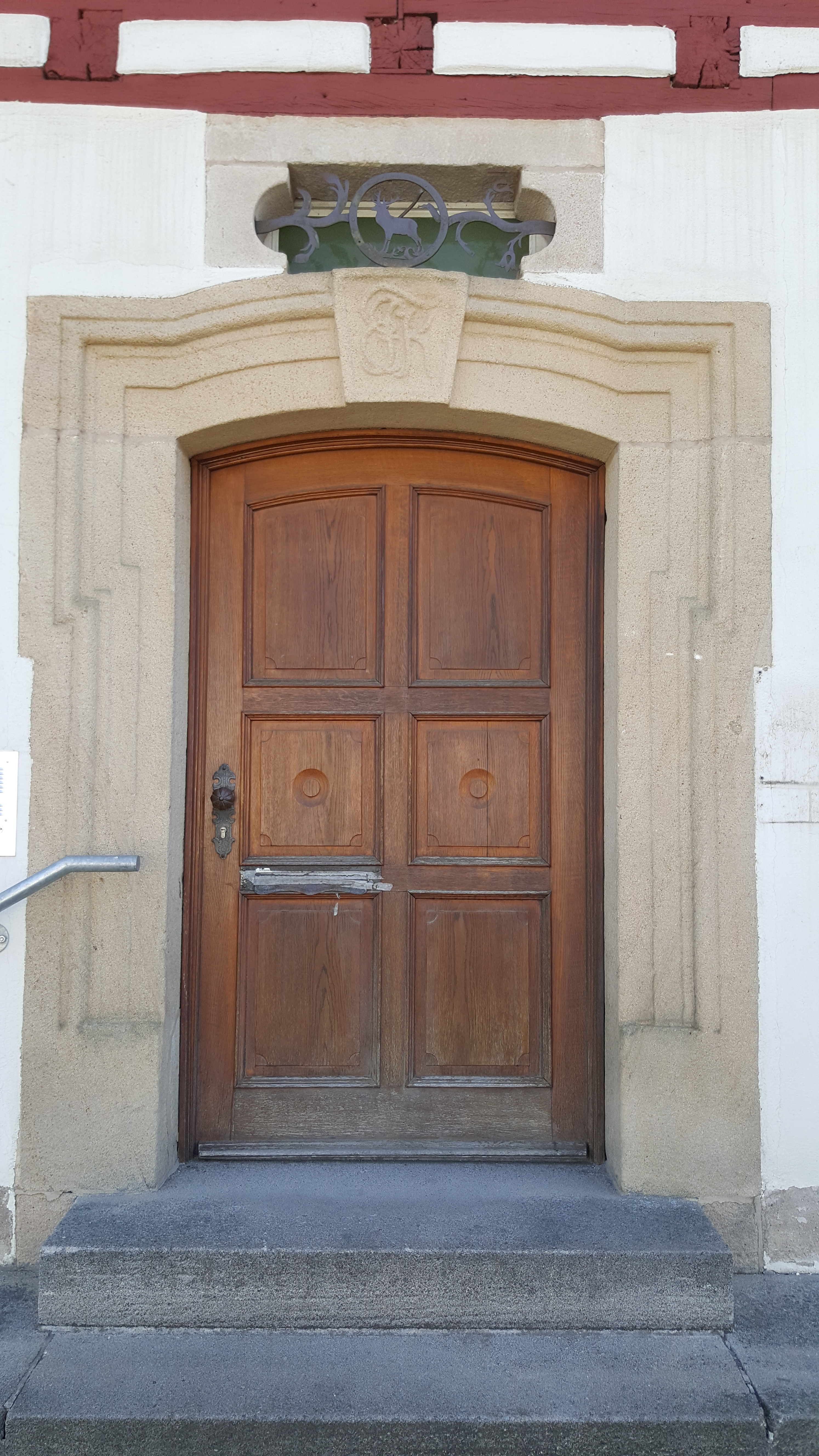 Hauptportal ehemaliges Forsthaus, klassizistisches Sandsteingewände mit Erbauerinitialen EFK für Ernst Friedrich Koch, königlich württembergischer Wildmeister